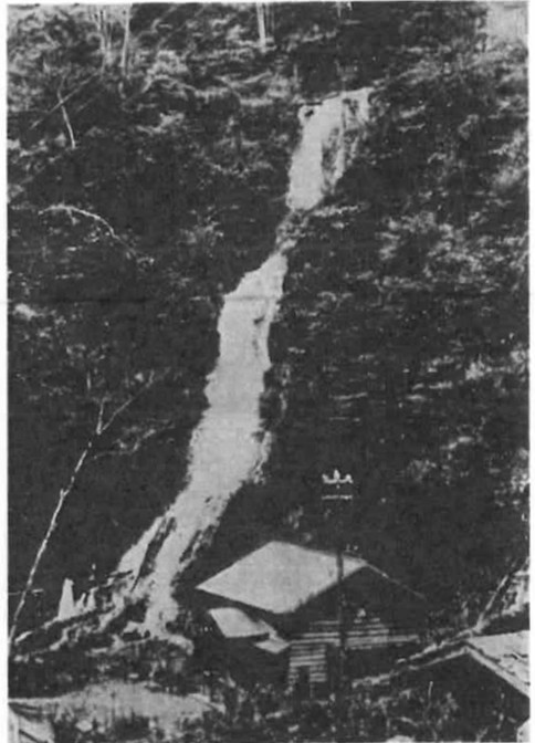 Insaku power station